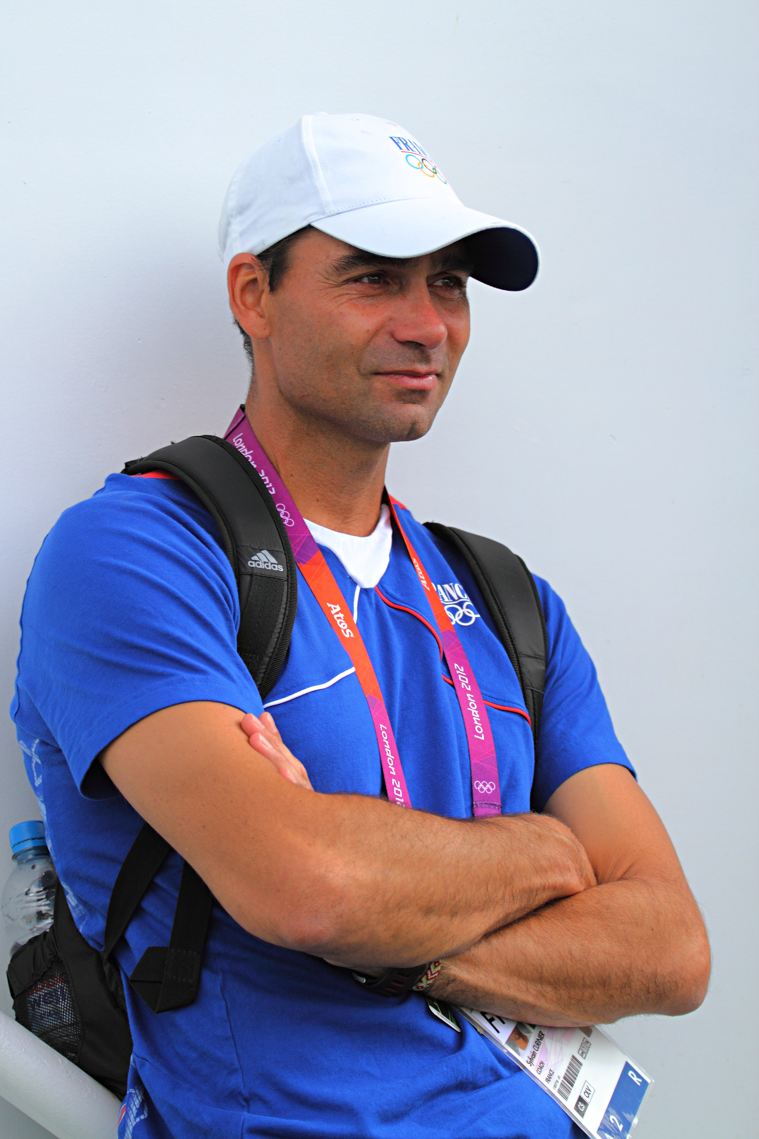 Olympic games london 2012